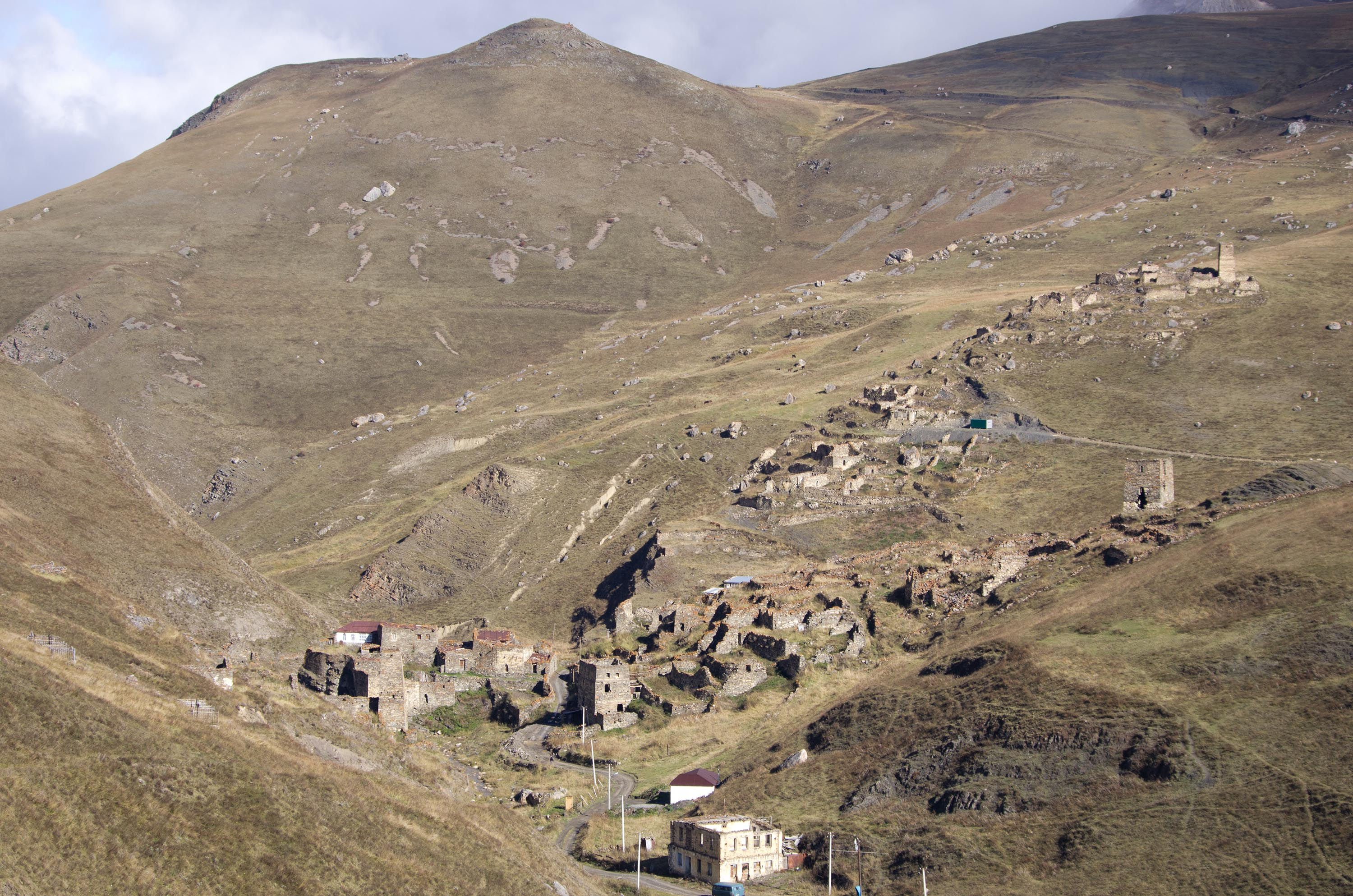 РСО-Алания ФГБУ "Национальный парк "Алания"